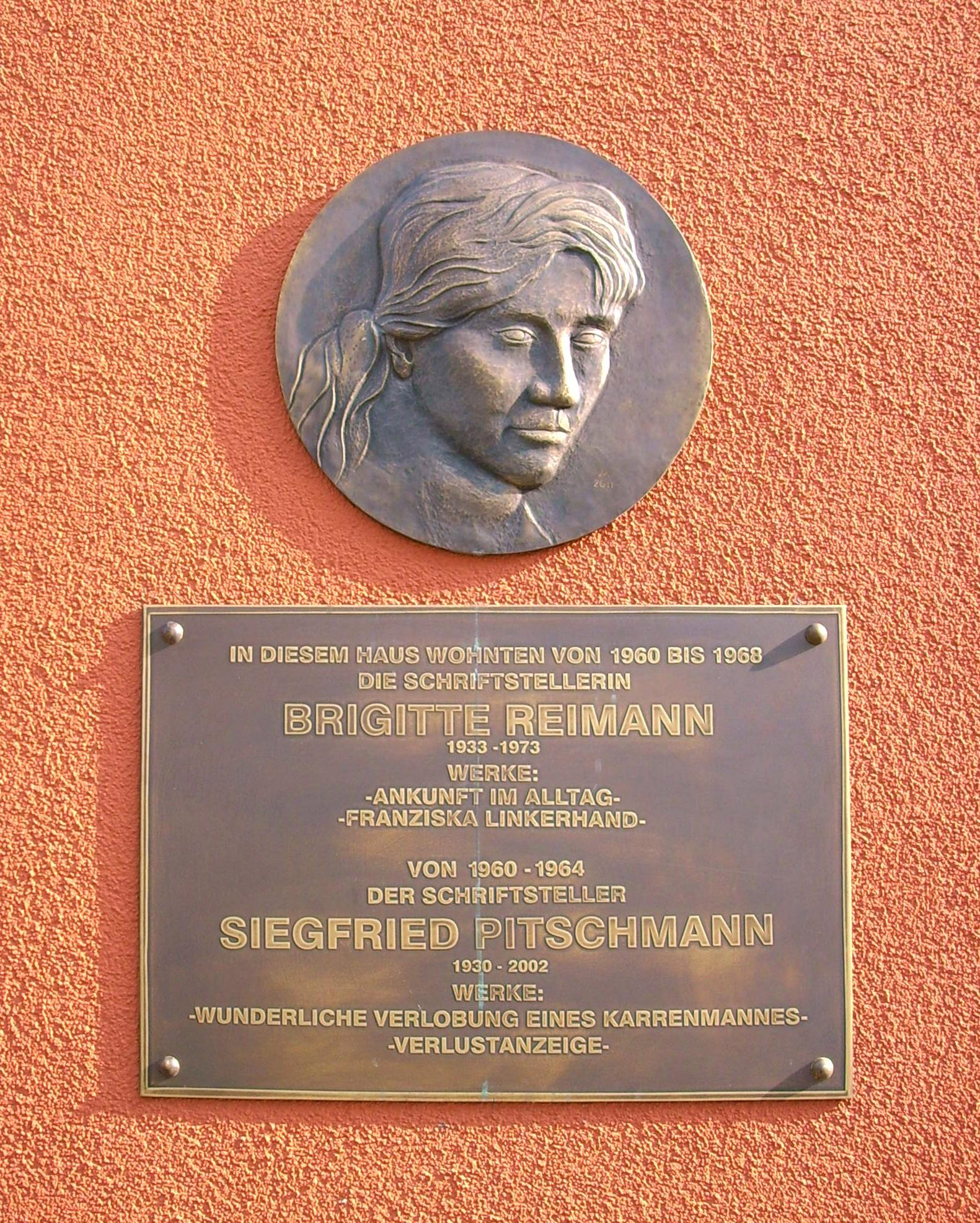 Gedenktafel für Brigitte Reimann und Siegfried Pitschmann am Wohnblock Liselotte-Herrmann-Straße 20, WK I, in Hoyerswerda